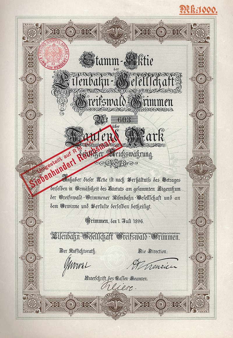 Aktie über 1000 Mark der Eisenbahn-Gesellschaft Greifswald-Grimmen vom 1. Juli 1896